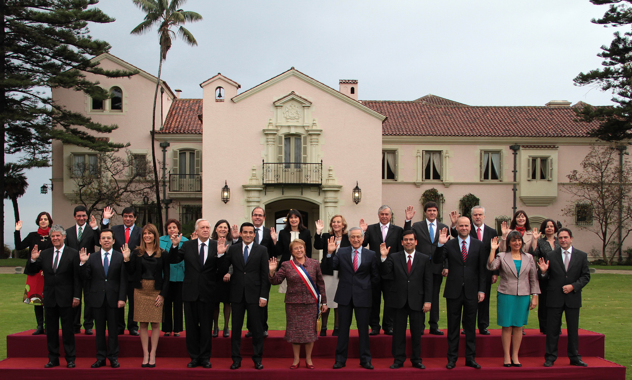 Presidenta participó en la Fotografía Oficial junto a su gabinete para la Cuenta del 21 de mayo.